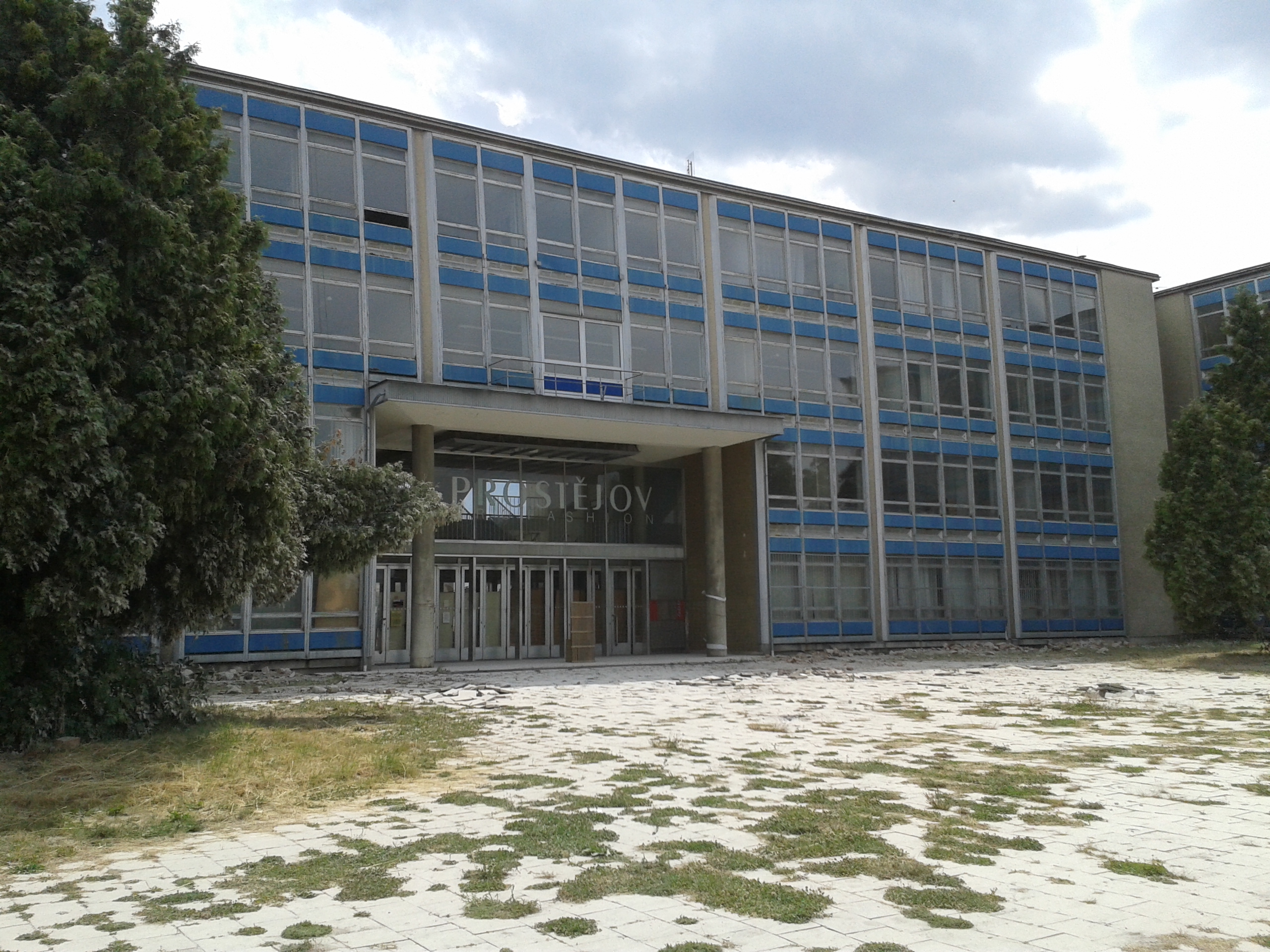 OP Prostějov